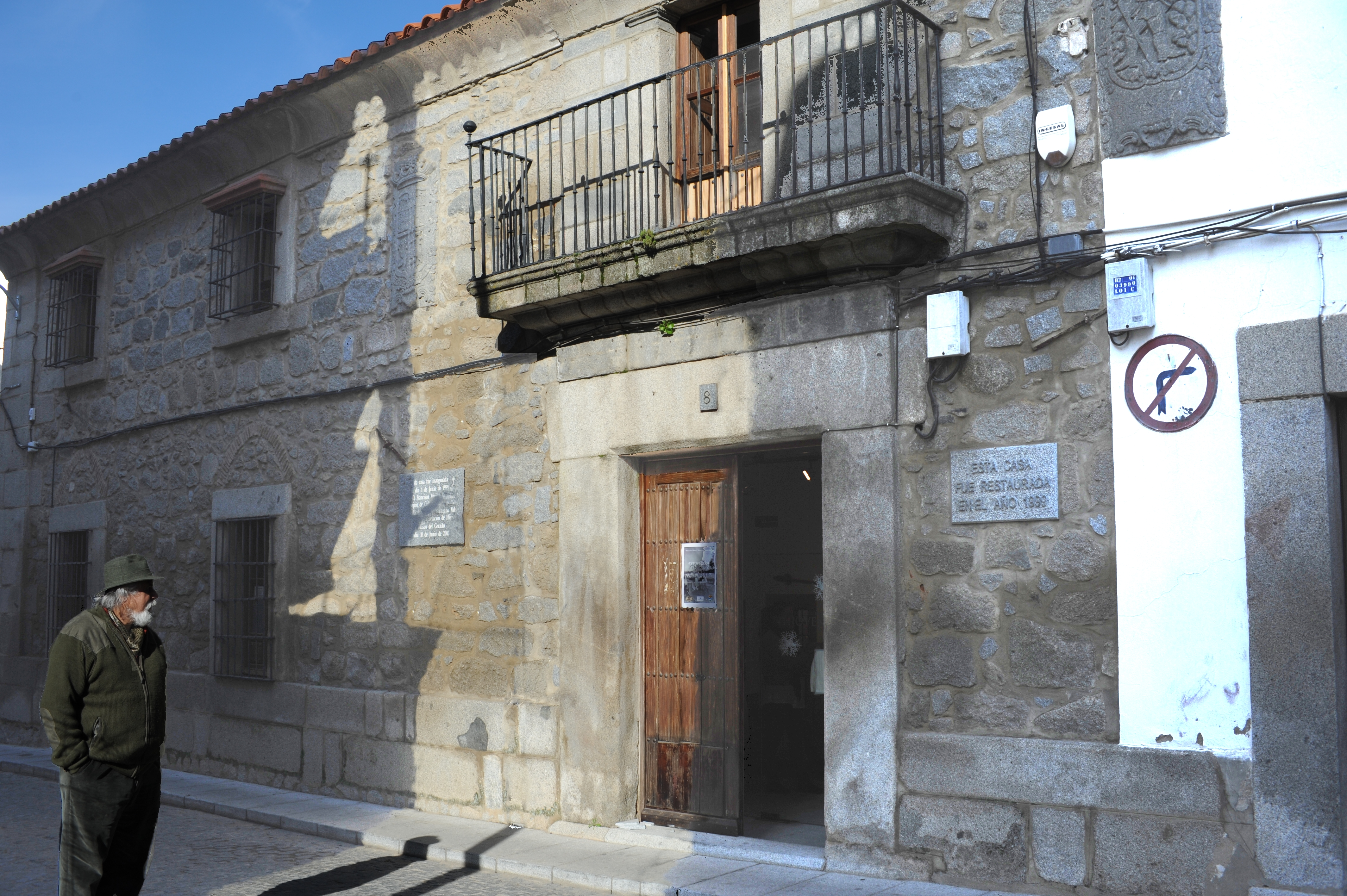 fotografía del museo del granito